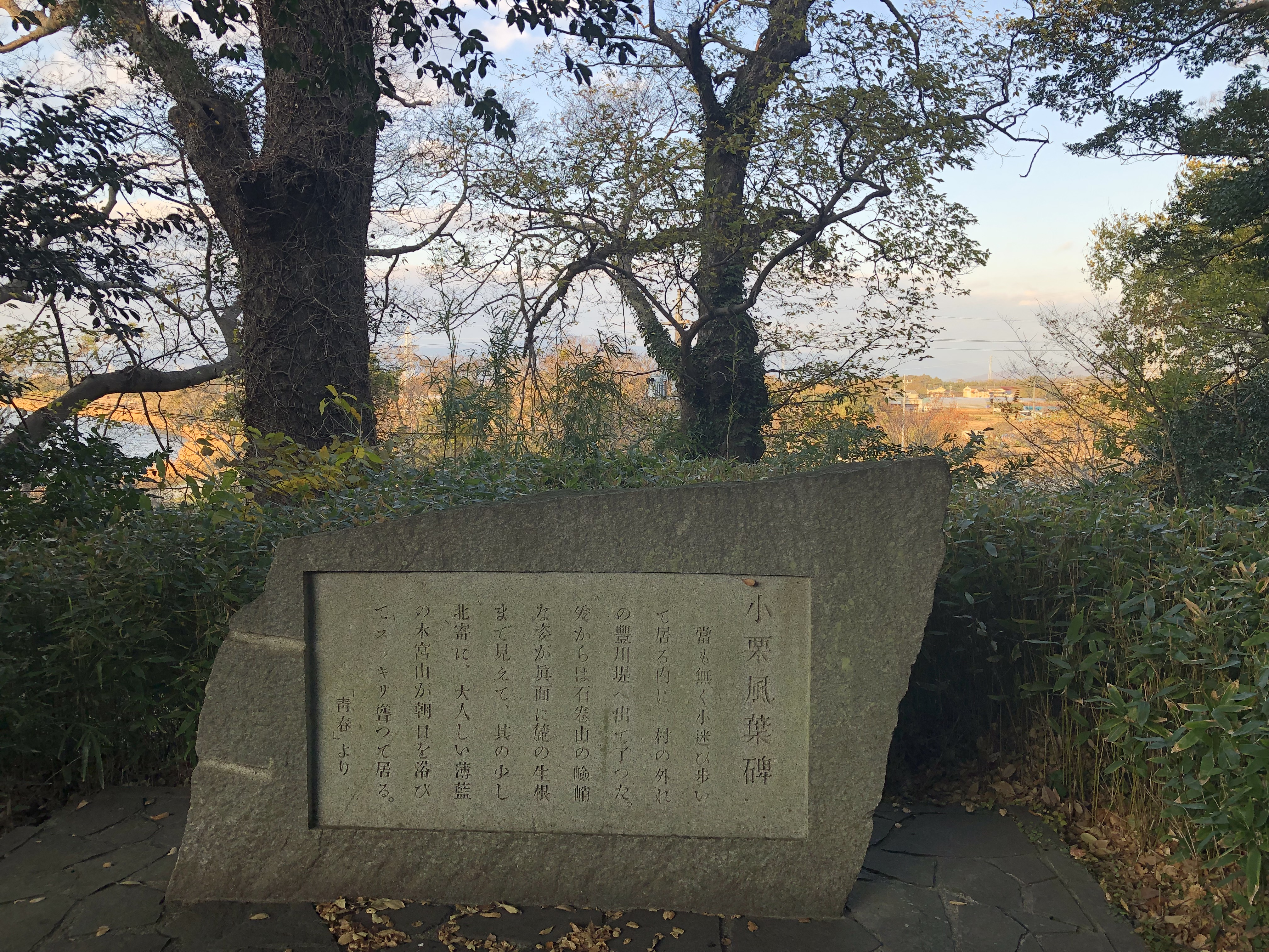 豊橋市今橋町の三の丸会館内にある小栗風葉の碑。小栗の小説『青春』中にある豊川堤から見える景色の描写部分が引用されている。